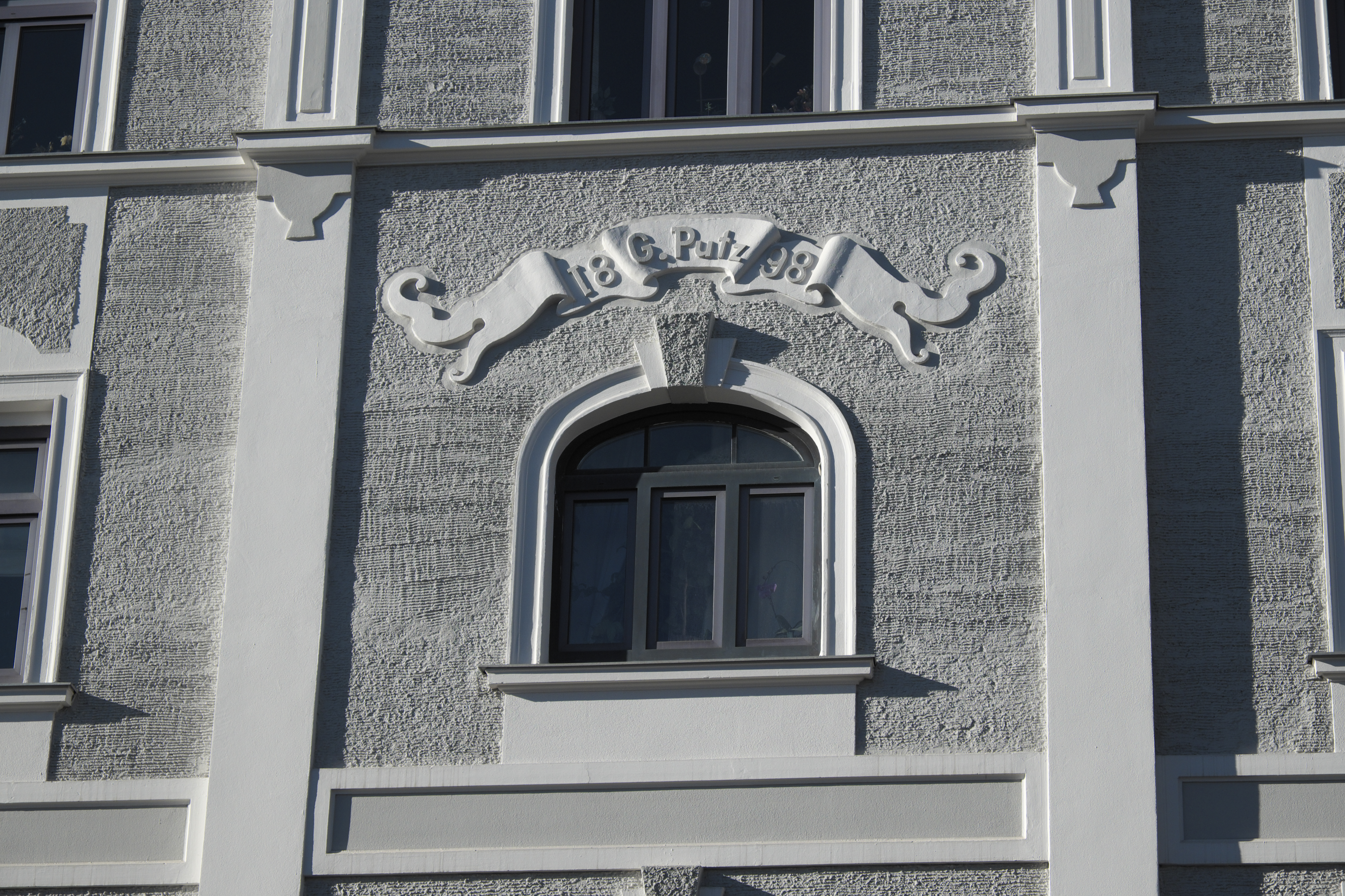 Mietshaus in der Planegger Straße 16 in Pasing im Stadtbezirk Pasing-Obermenzing in München (Bayern/Deutschland), mit der Inschrift G. Putz und der Jahreszahl 1898